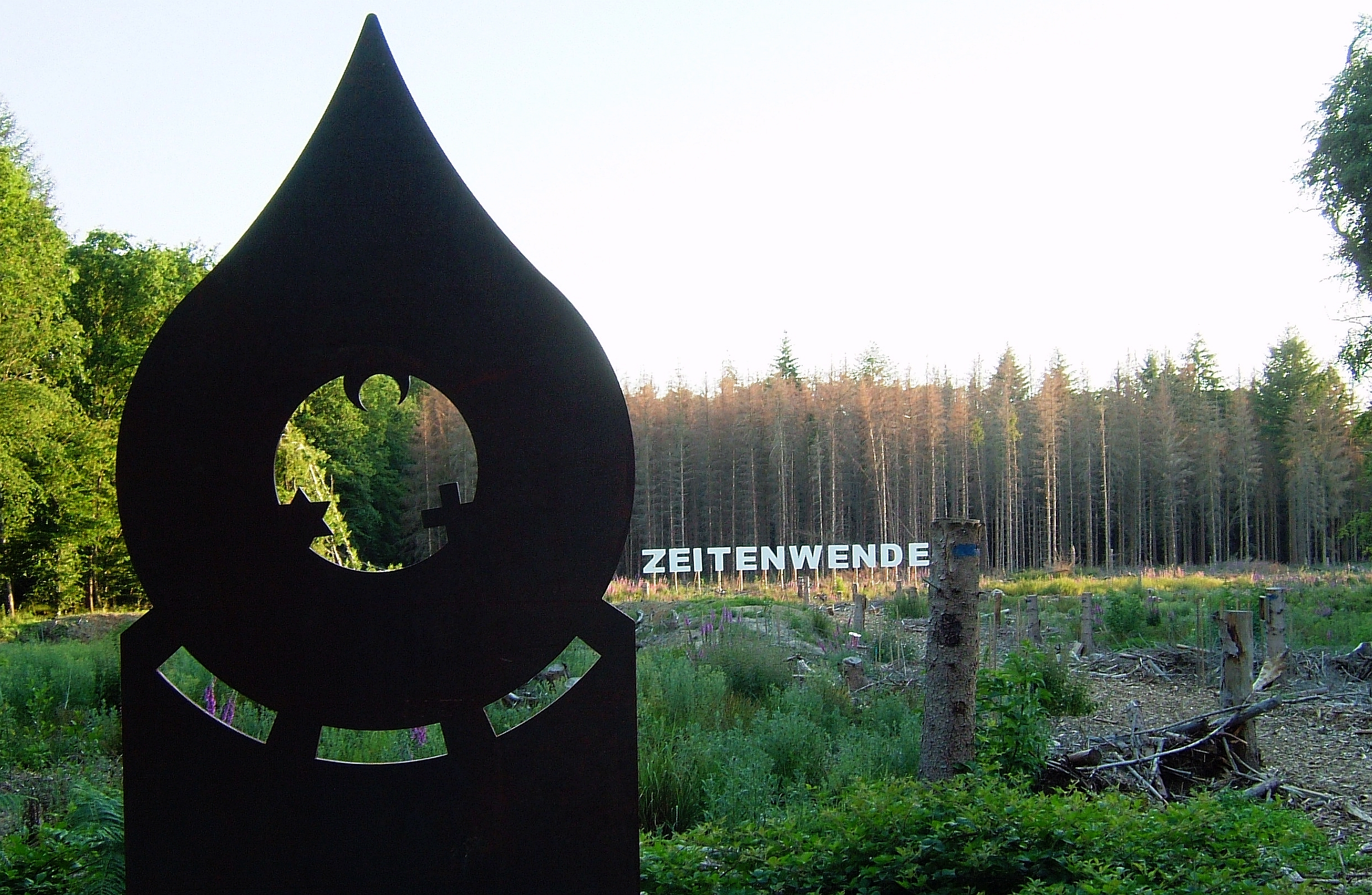 Kottenforst, Projekt ZEITENWENDE. Nähere Informationen unter und